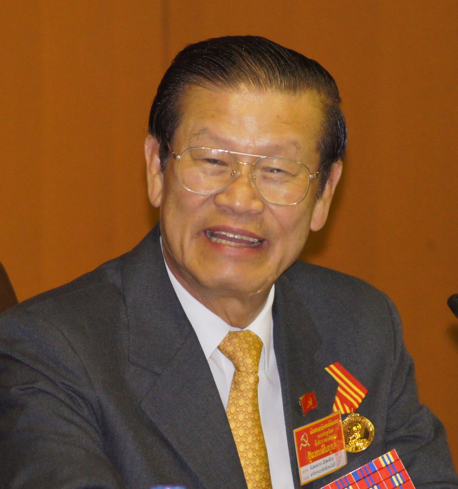 ソムサワート